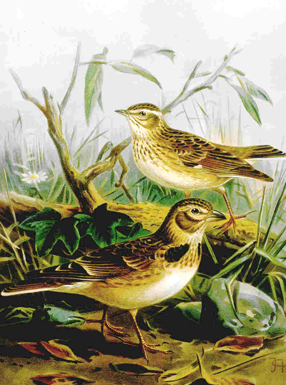 aus: NAUMANN, NATURGESCHICHTE DER VÖGEL MITTELEUROPAS: Band III, Tafel 2 - Gera, 1900 (PD)